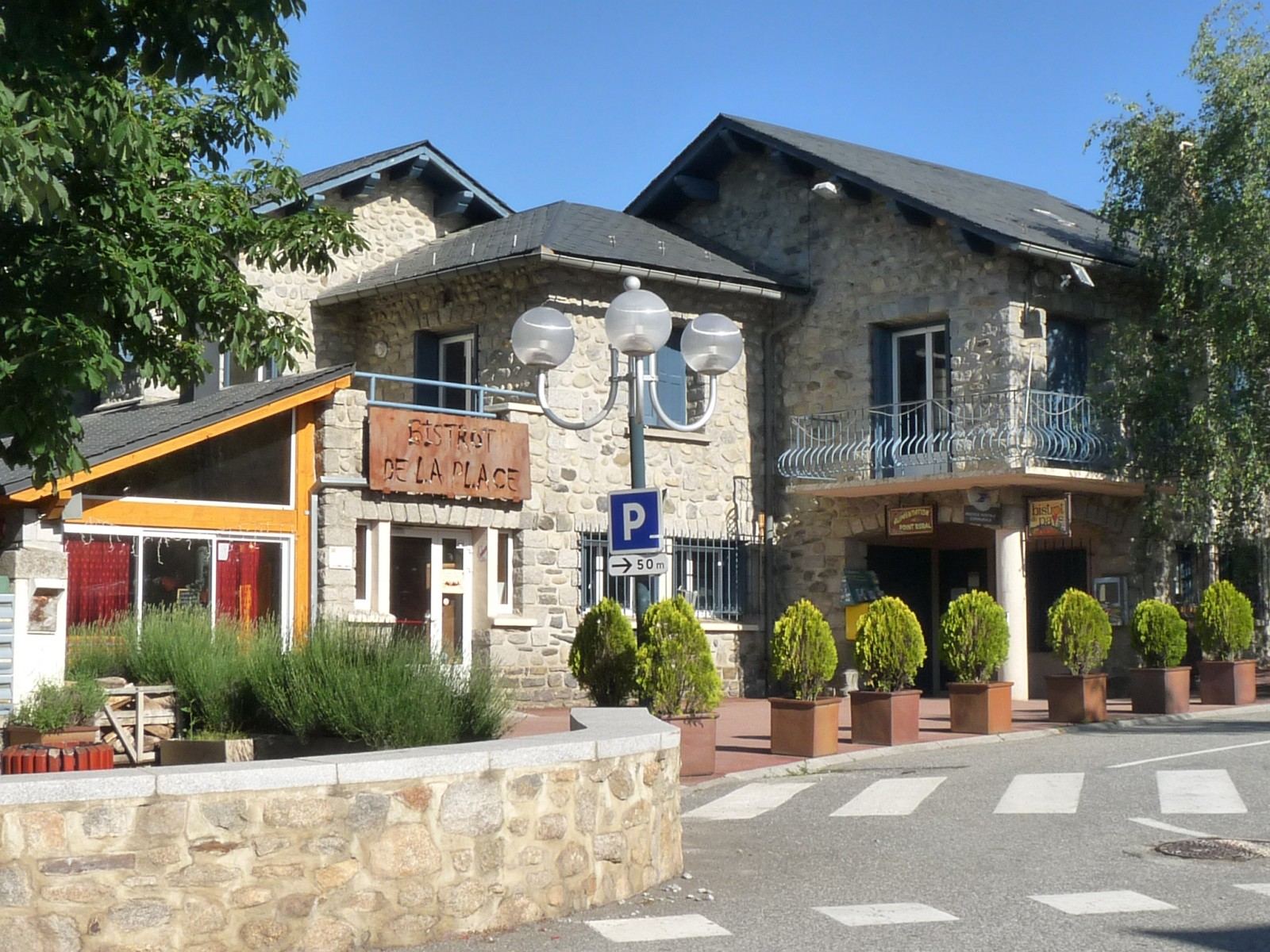 Bar-restaurant et épicerie-tabac, Ur, Pyrénées-Orientales, France